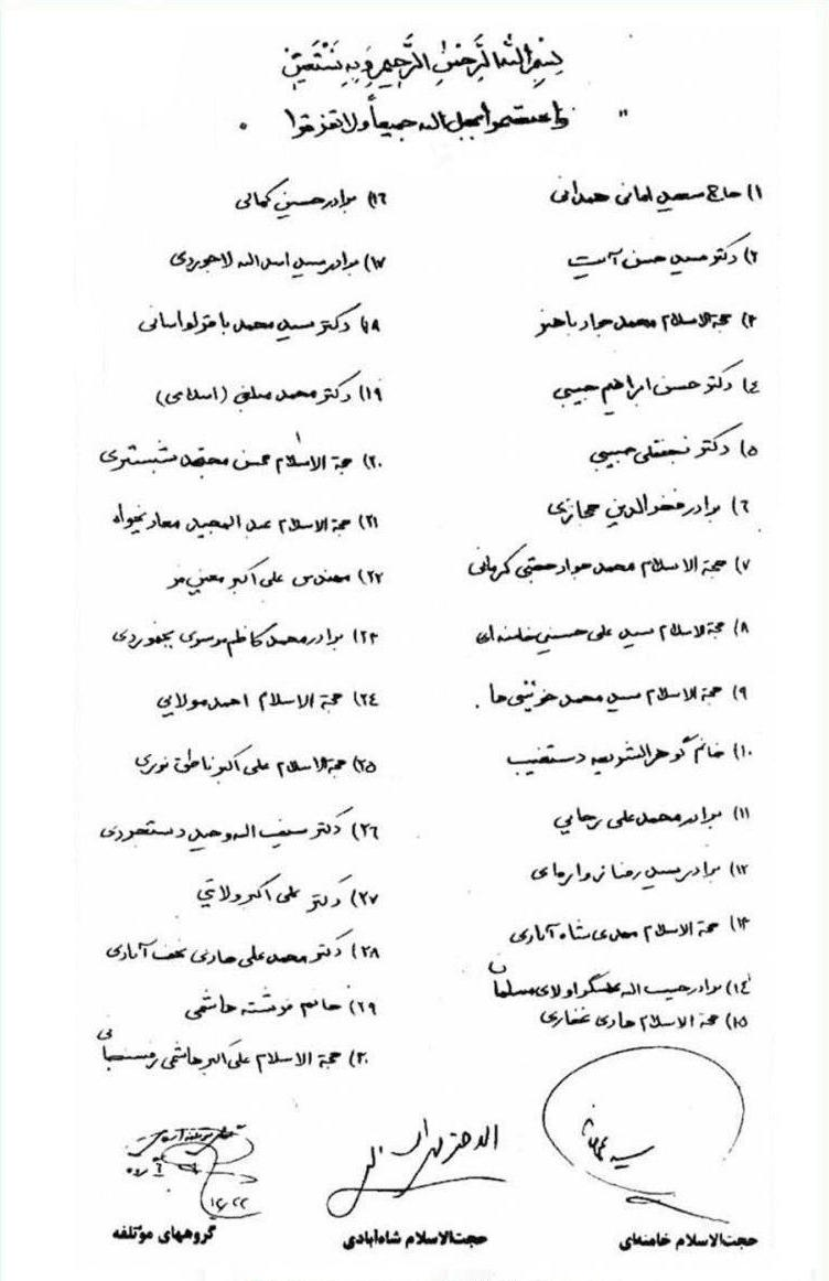 فهرست نامزدهای «ائتلاف بزرگ نیروهای خط امام» برای اولین دوره مجلس شورای اسلامی با امضای آیت‌الله خامنه‌ای‌ و گروه‌های موتلفه اسلامی